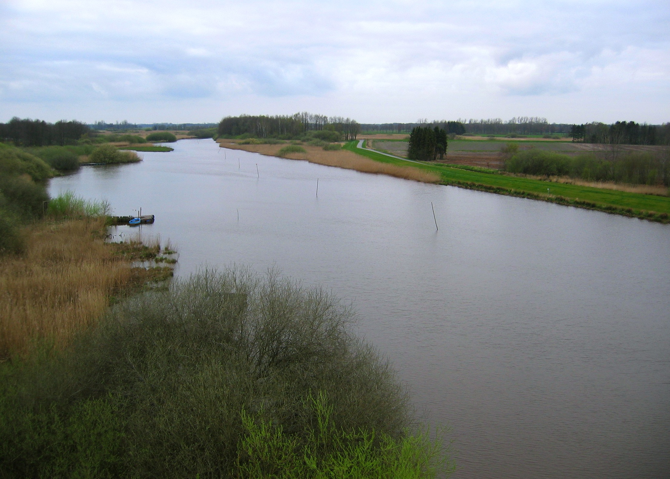 Barßel: Blick vom Aussichtsturm am Bootshafen auf die Soeste (Richtung WNW)